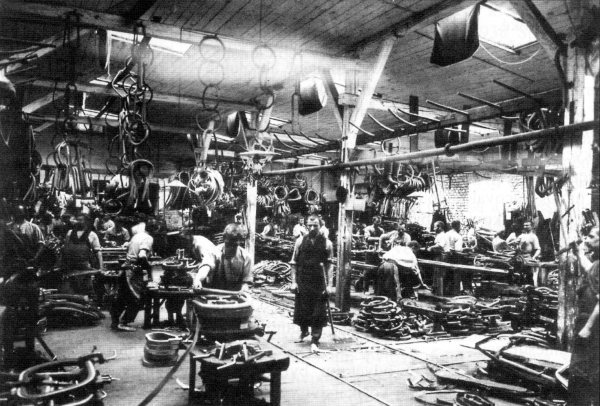 Výroba ohýbaného nábytku v bystřickém závodě Thonet Mundus